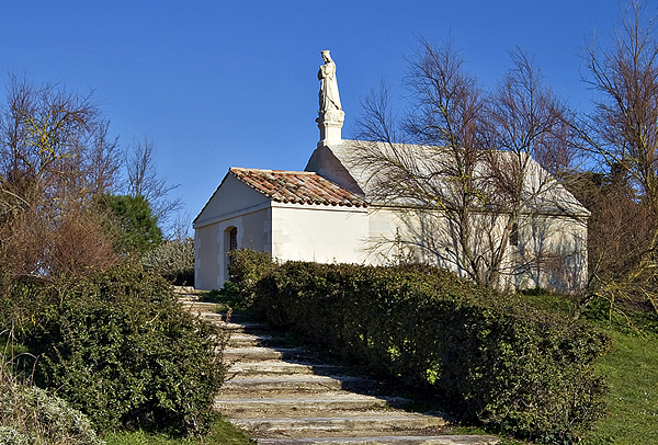 Chapelle/magasin à poudre, vestige de la redoute des Portes - Île de Ré - Charente Maritime